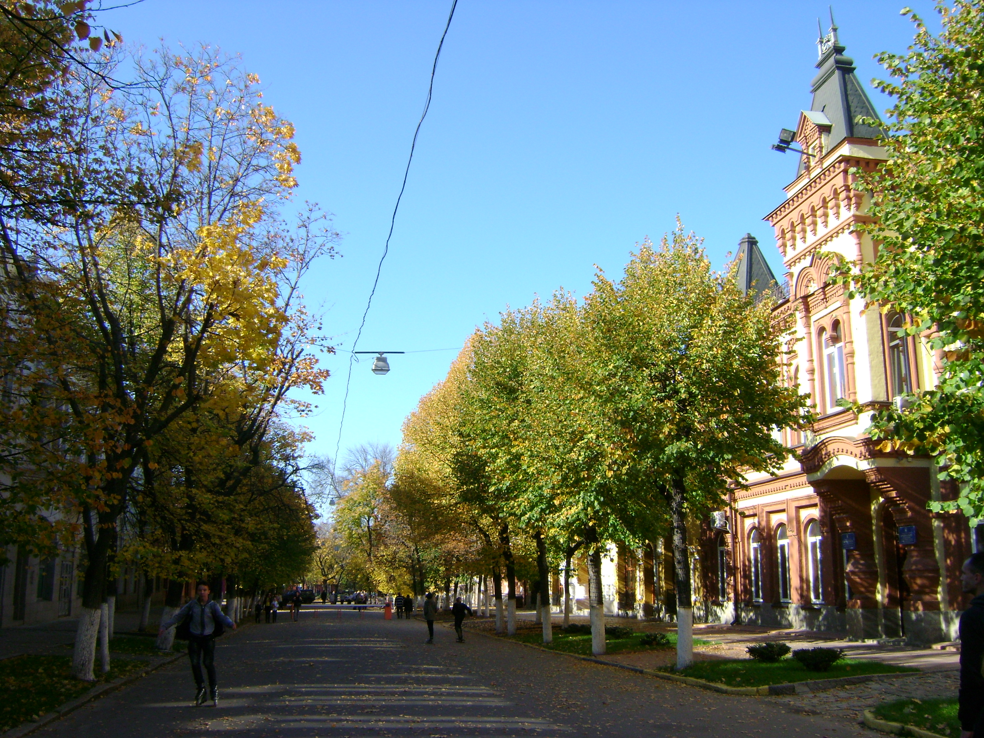 Вулиця Дворцова, Кіровоград, вул. Дворцова (від вул. Великої Перспективної до вул. Фрунзе)